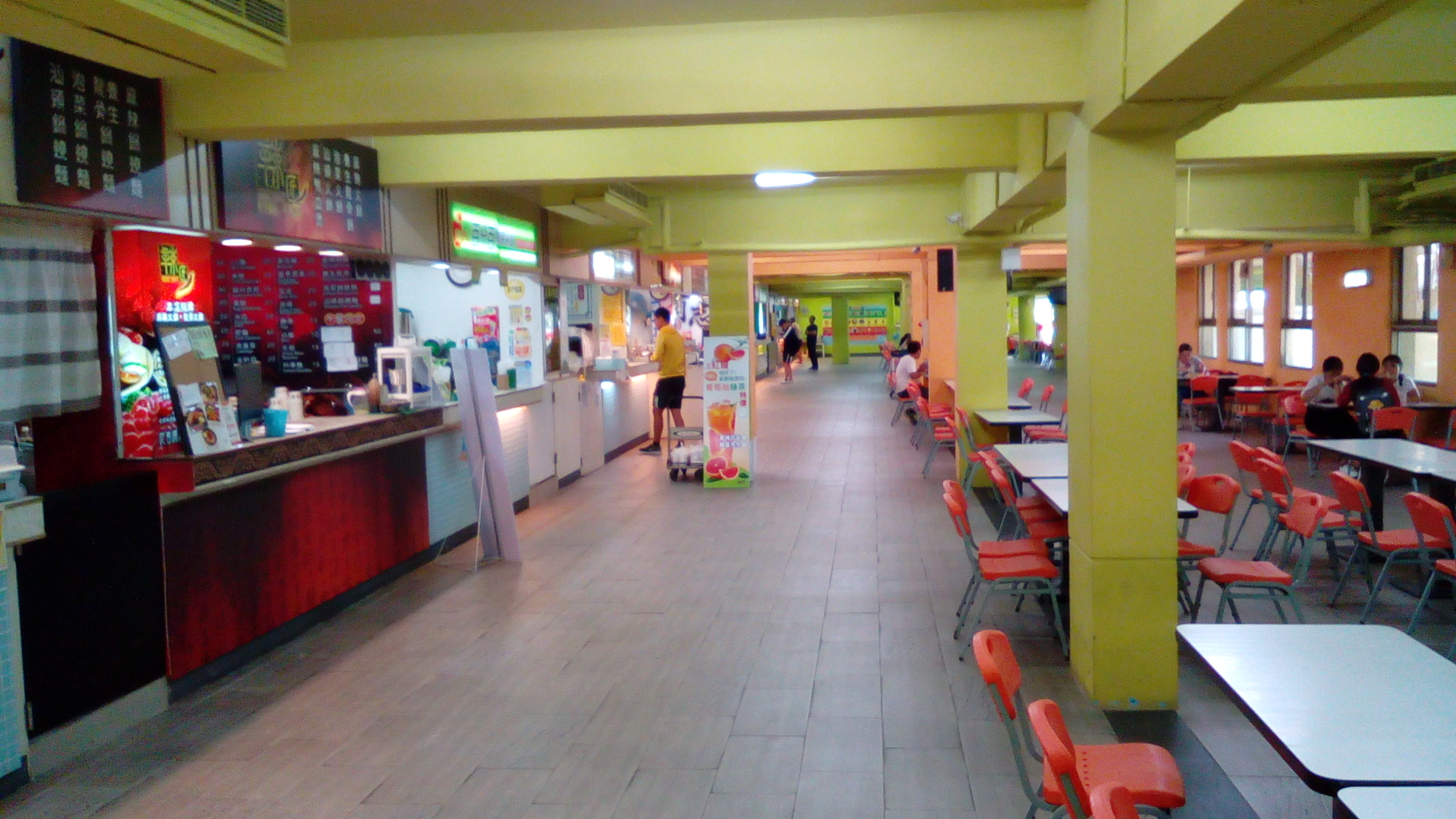 中文（台灣）: 崑山科技大學學生餐廳 位於宿舍南方